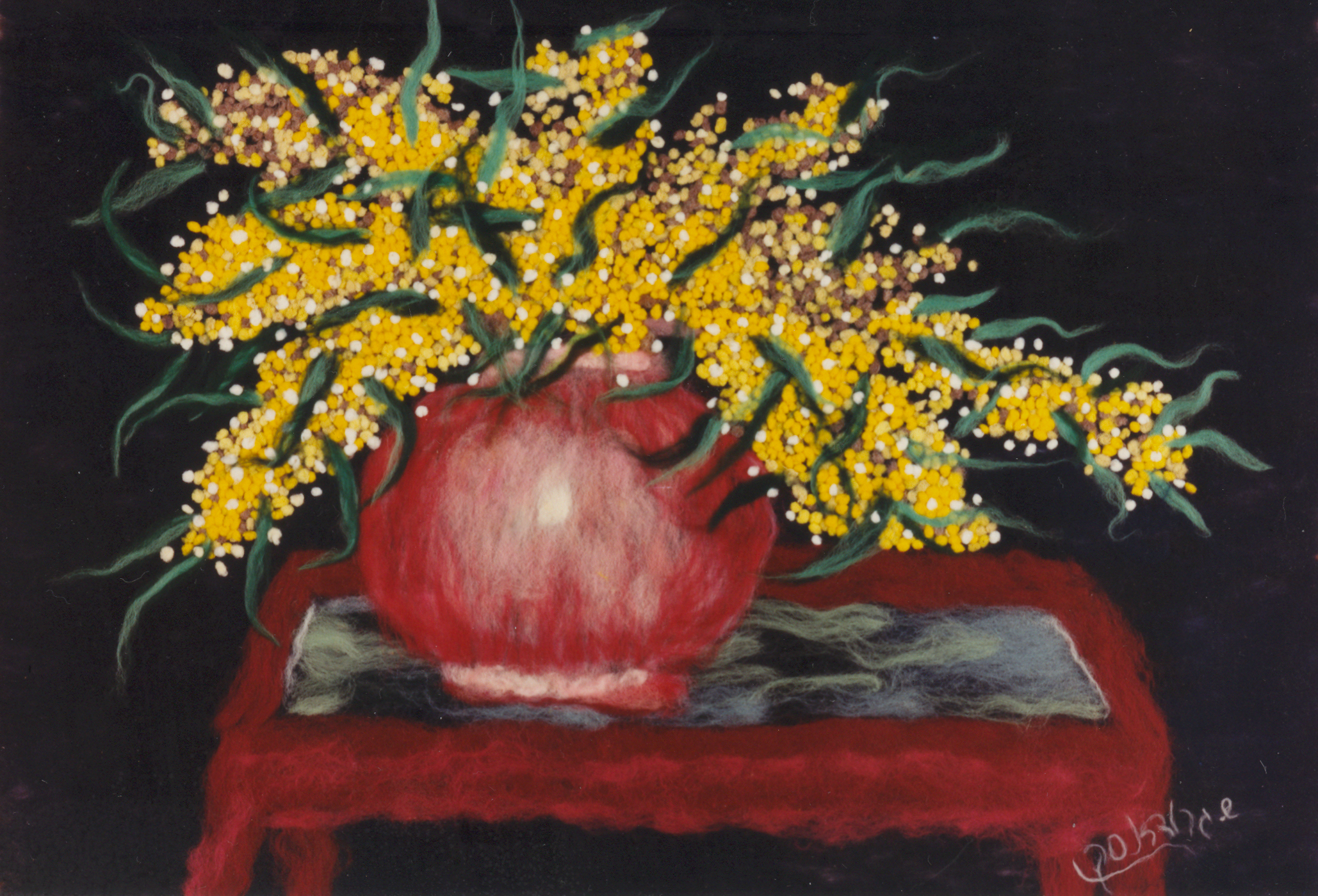 Mimosas, cuadro hecho con lana virgen.